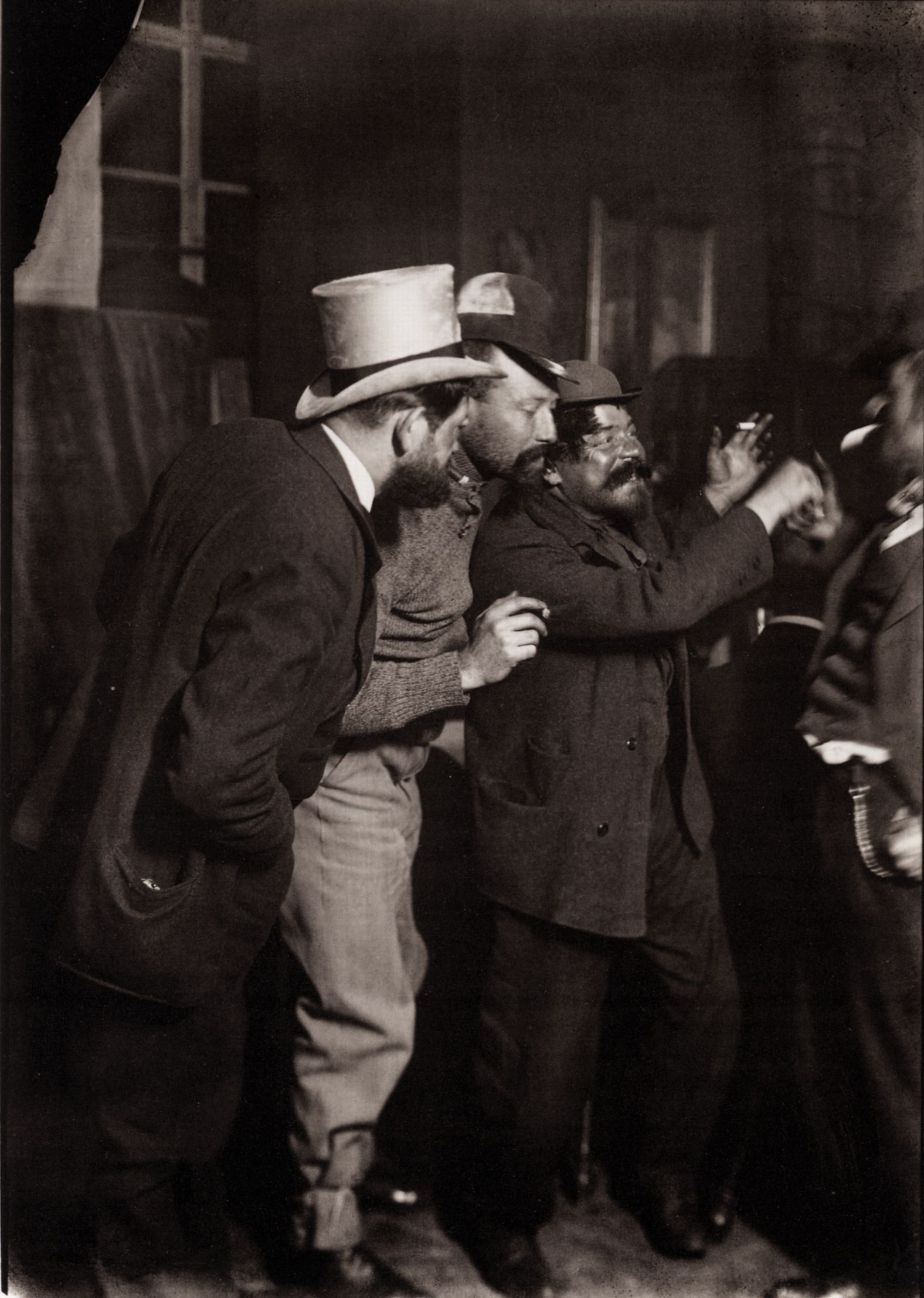 Zille, Heinrich: Künstlerkollegen und Ateliers, Atelierfest bei Walter Meyer-Lüben. Von links: Heinrich Zille, die Bildhauer Nikolaus Friedrich und Jakob August Heer